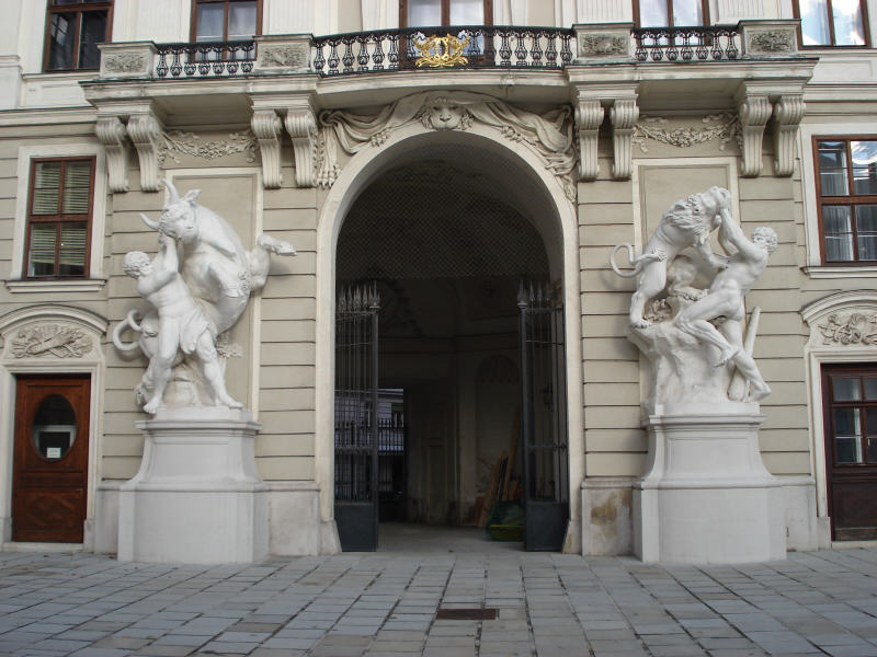 Lorenzo Mattielli: Skulpturen am Reichskanzleitrakt der Wiener Hofburg